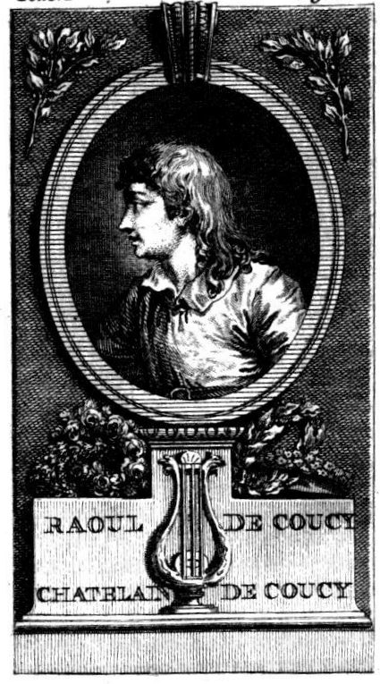 Gravure extraite d'un ouvrage du XVIIIe siècle, Mémoires historiques sur Raoul de Coucy de M. de Laborde, p. 3, représentation fantaisiste du Châtelain de Coucy, trouvère du XIIe siècle et personnage du Roman du châtelain de Couci et de la dame de Fayel. Laborde veut démontrer que le héros malheureux du Roman, s'il a une existence historique, n'est pas Raoul 1er, sire de Coucy.